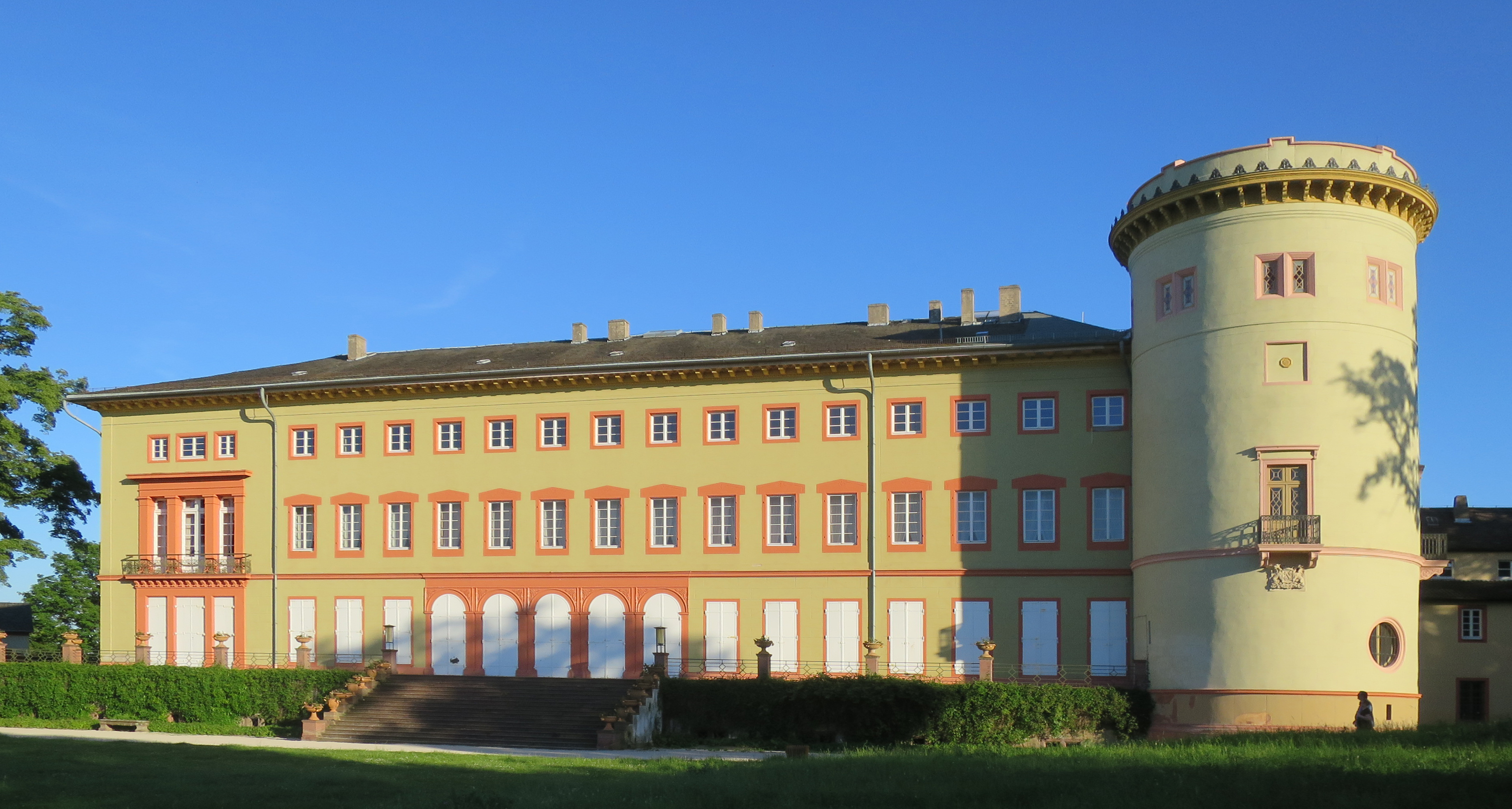 Nordfassade des Schlosses Herrnsheim